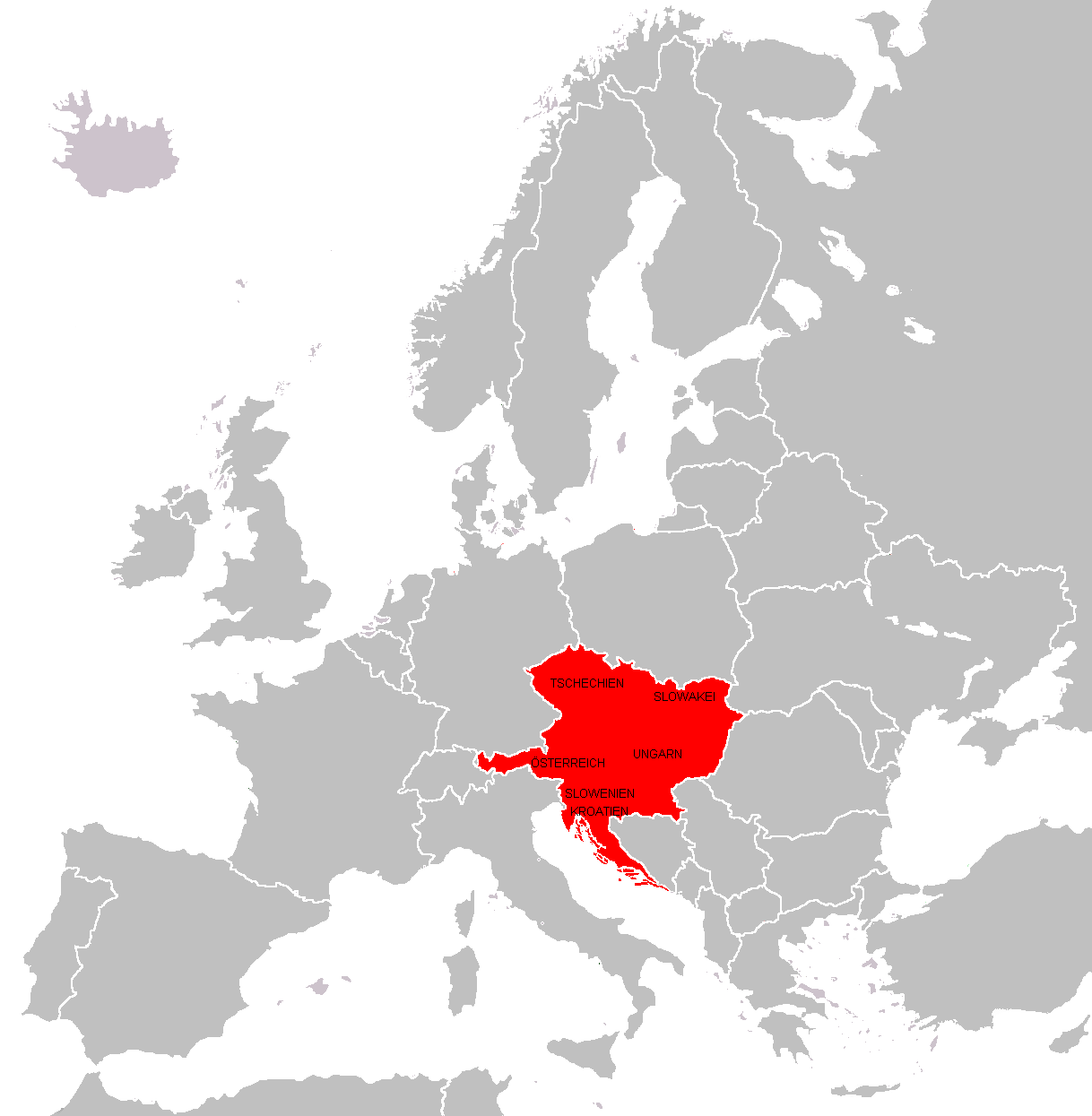 Darstellung eines Staatenbundes nach den Vorstellungen der SGA